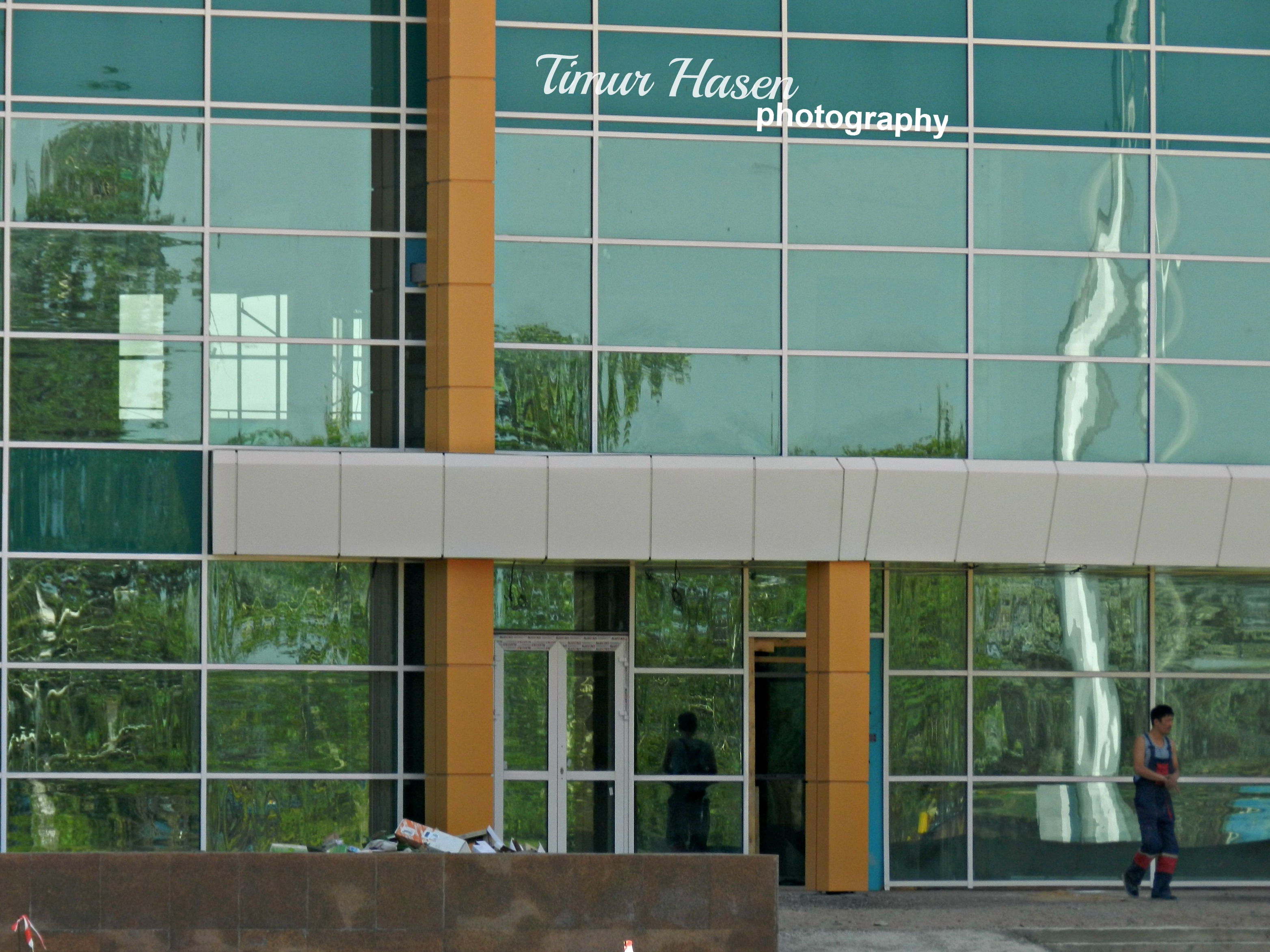 Здание нового аэропорта Кокшетау